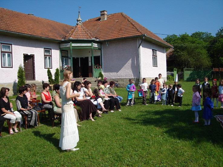 EVZARO.